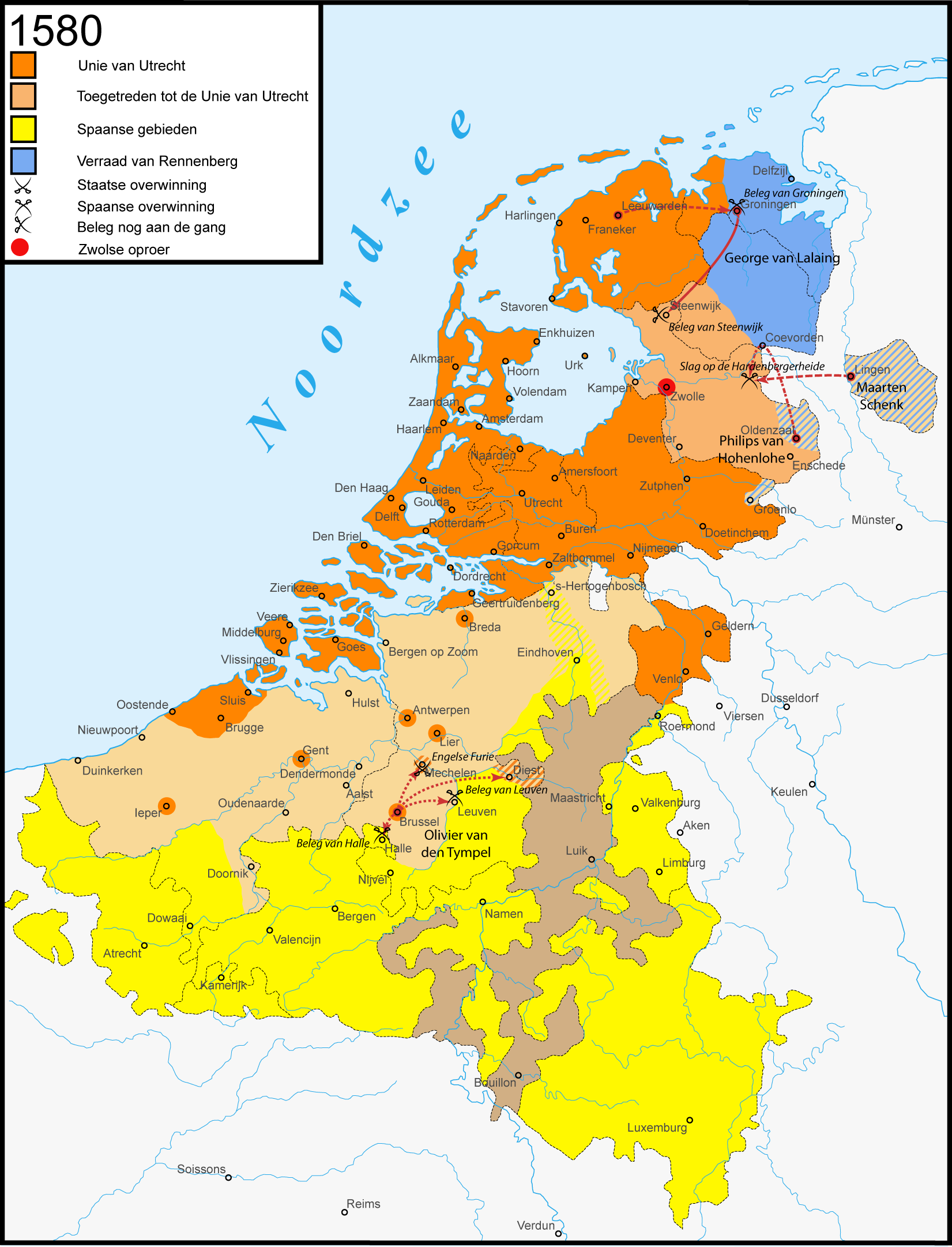 Krijgsbewegingen in de Tachtigjarige Oorlog: 1580. Nederlandse versie Engels: Warprogression in het Eighty Years' War: 1580. Dutch version